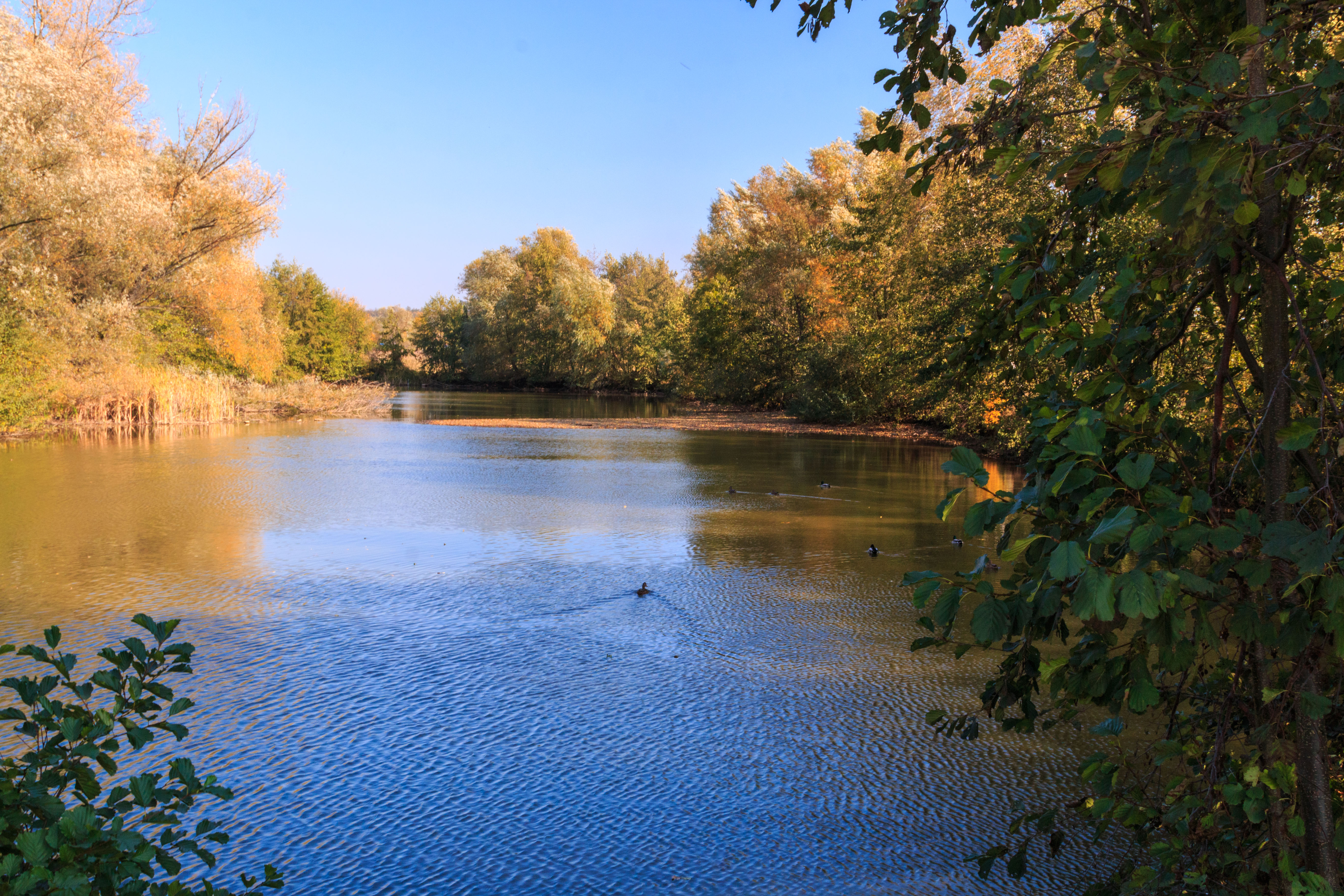 Černé jezero - mrtvé rameno Orlice u Hradce Králové Project: Vodstvo.